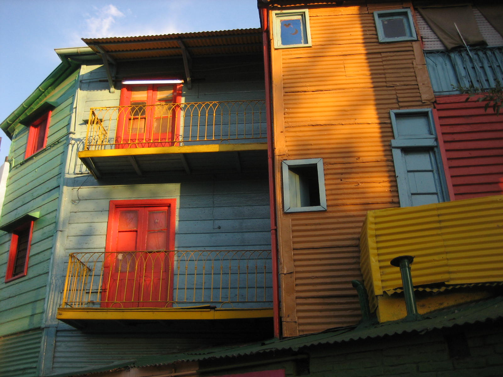 Conventillo en el barrio de La Boca, Ciudad Autónoma de Buenos Aires, Argentina.